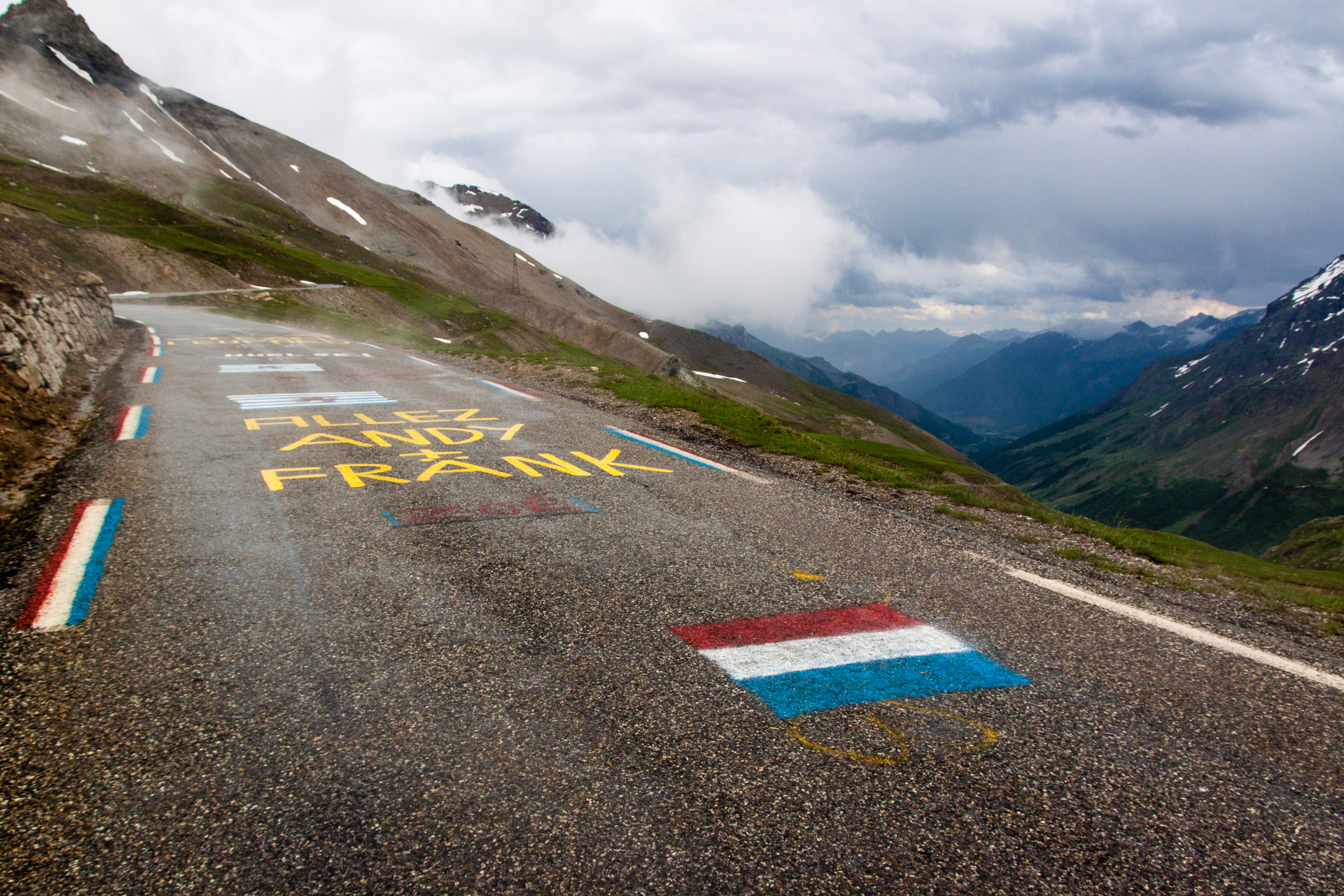 Col du Galibier, France